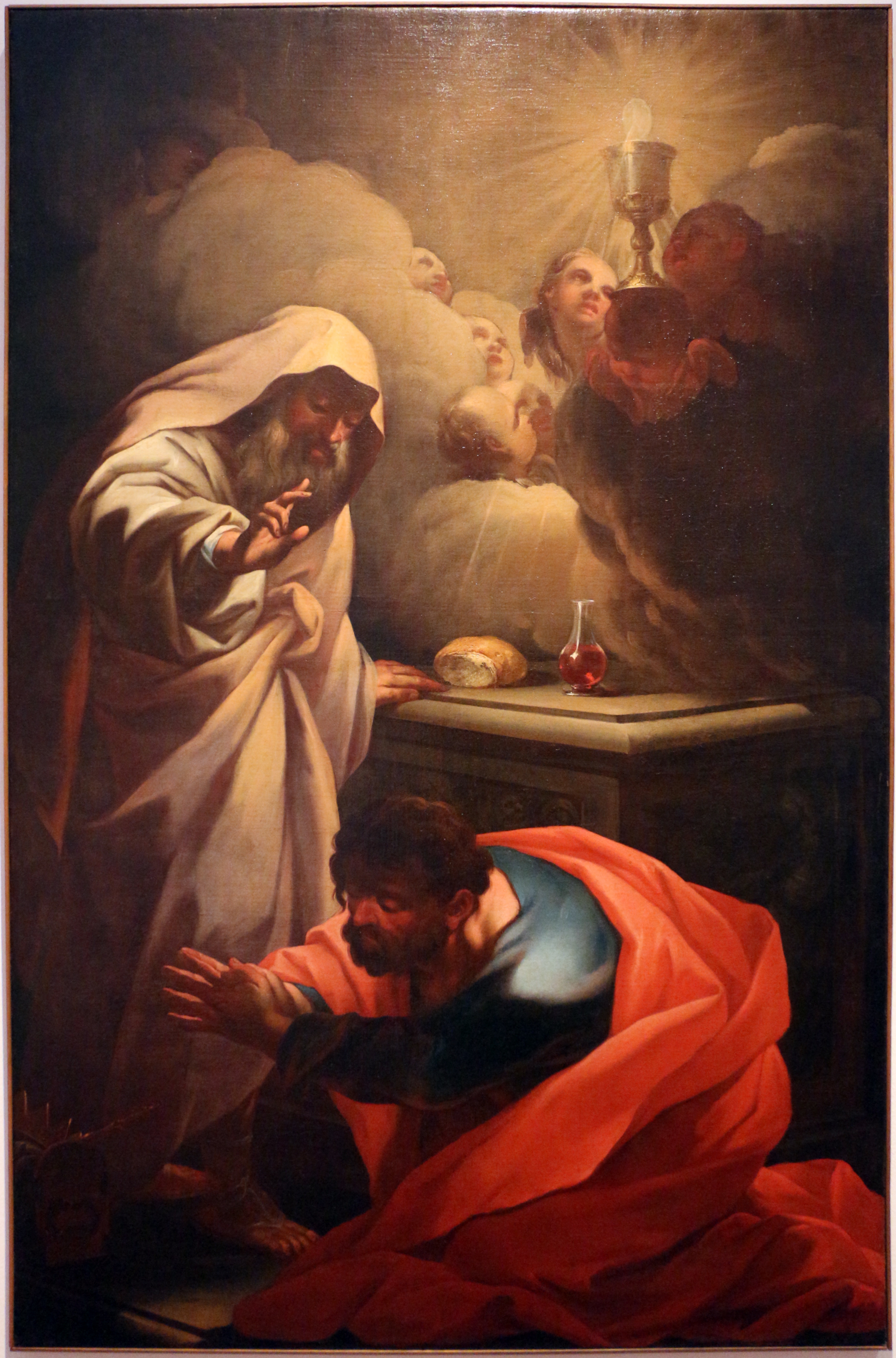 Palazzo Pretorio (Museo Diocesano Tridentino) This is a photo of a monument which is part of cultural heritage of Italy.